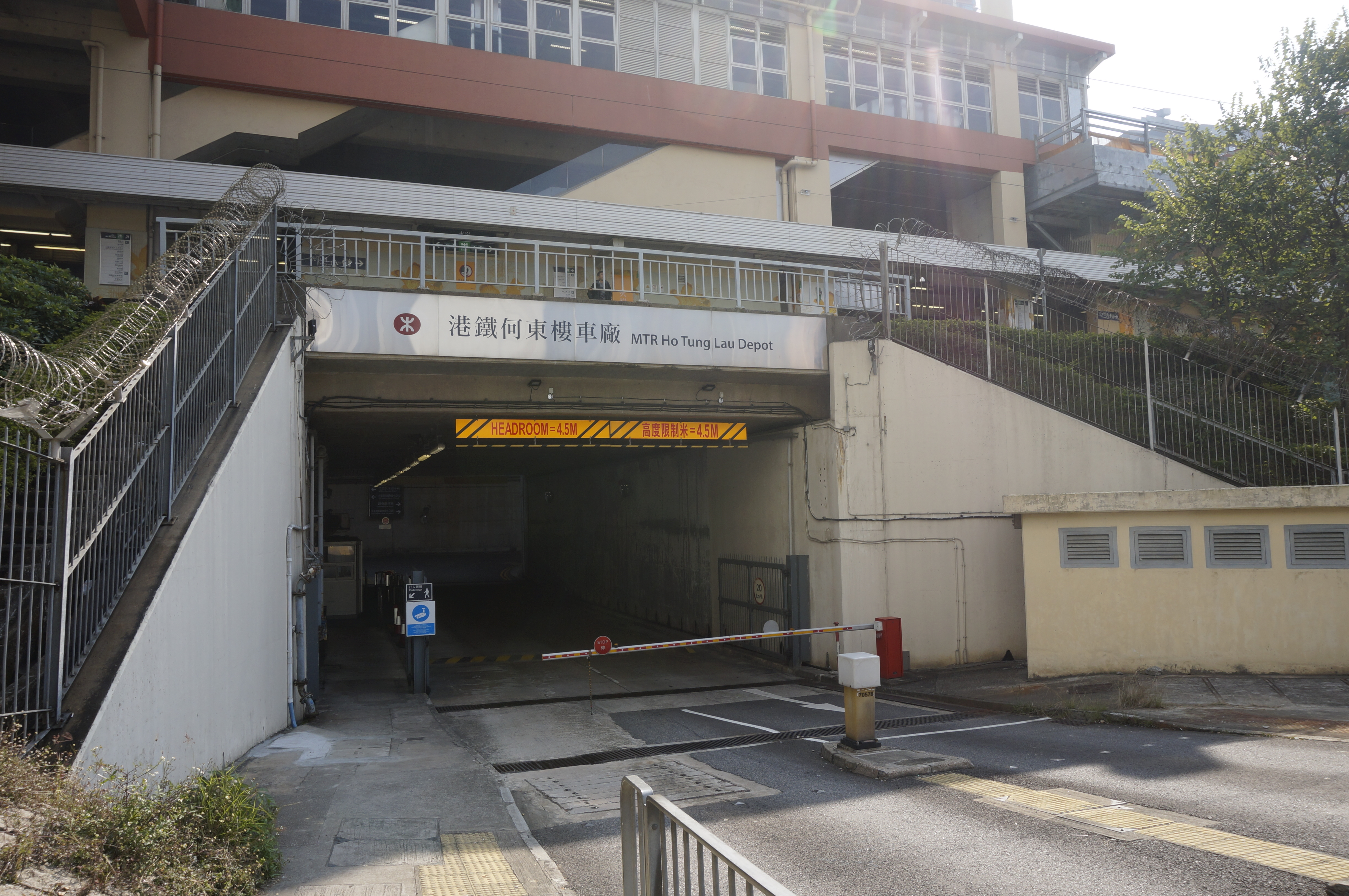 何東樓車廠出入口